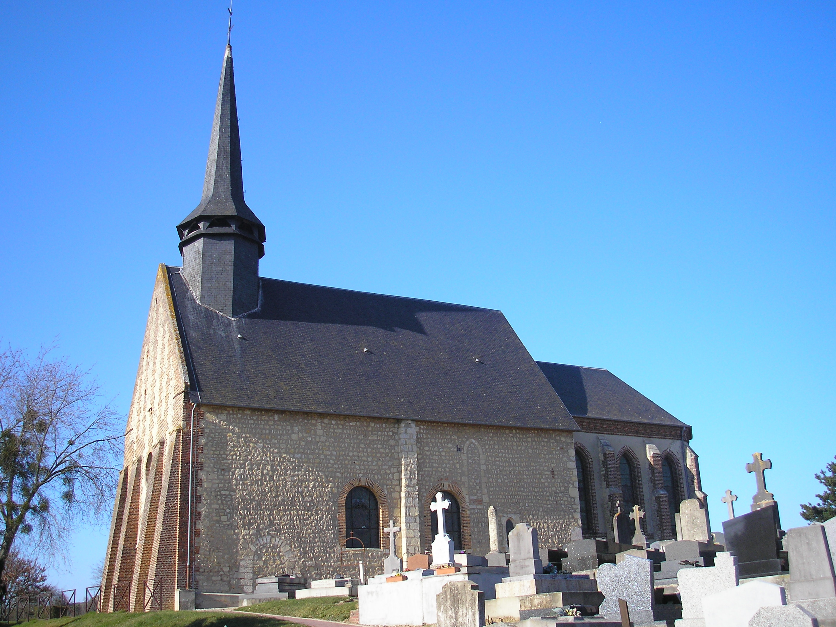 Glos (Normandie, France). L'église Saint-Sylvain.